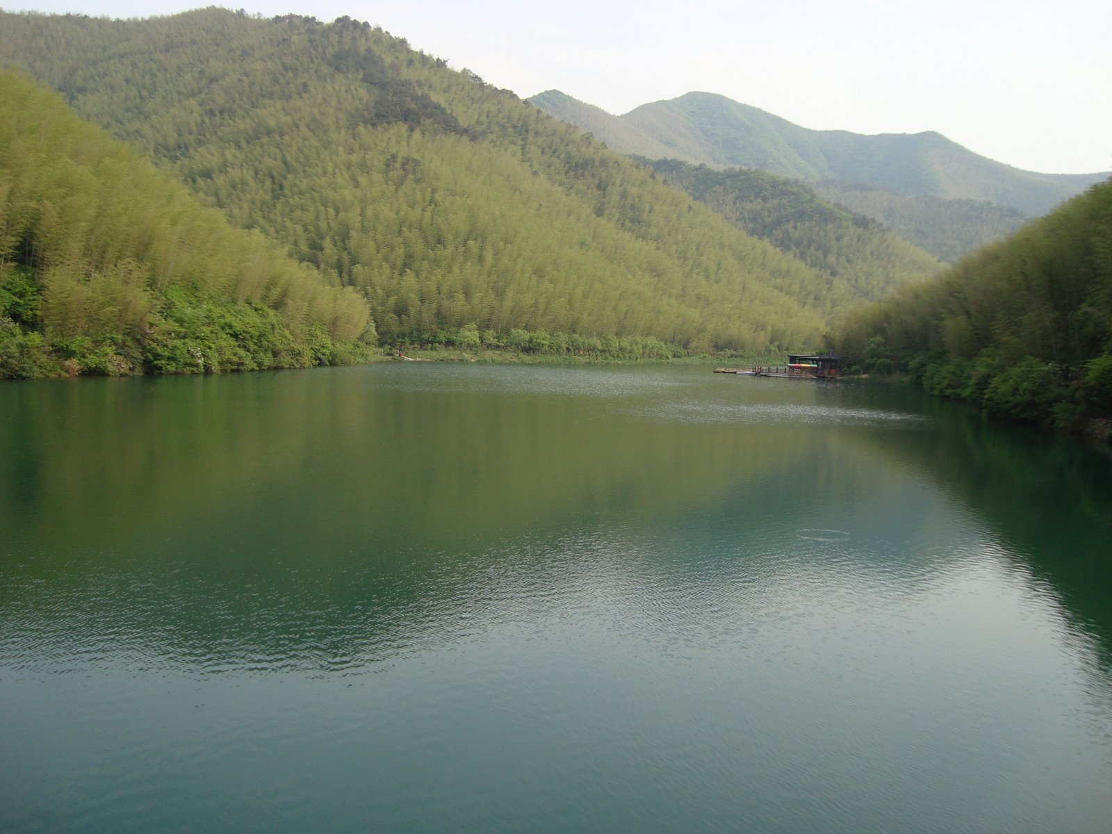 中文（中国大陆）: 江苏常州溧阳市南山竹海的静湖